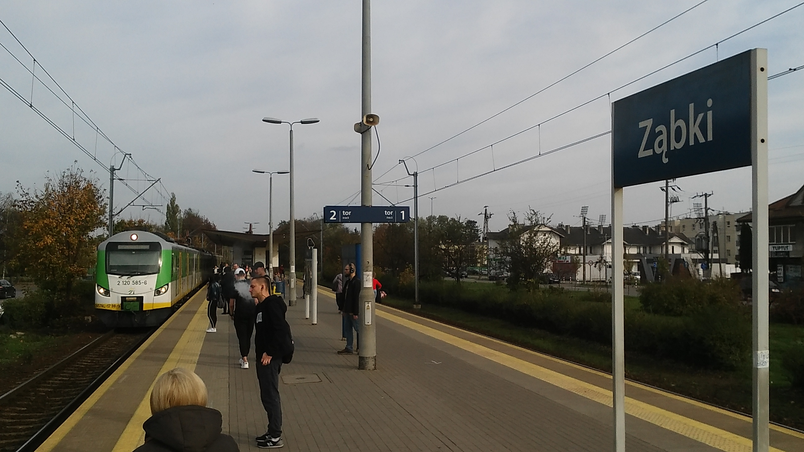 przystanek kolejowy Ząbki - przyjazd pociągu osobowego Kolei Mazowieckich KM 11774 relacji Tłuszcz - Warszawa Wileńska